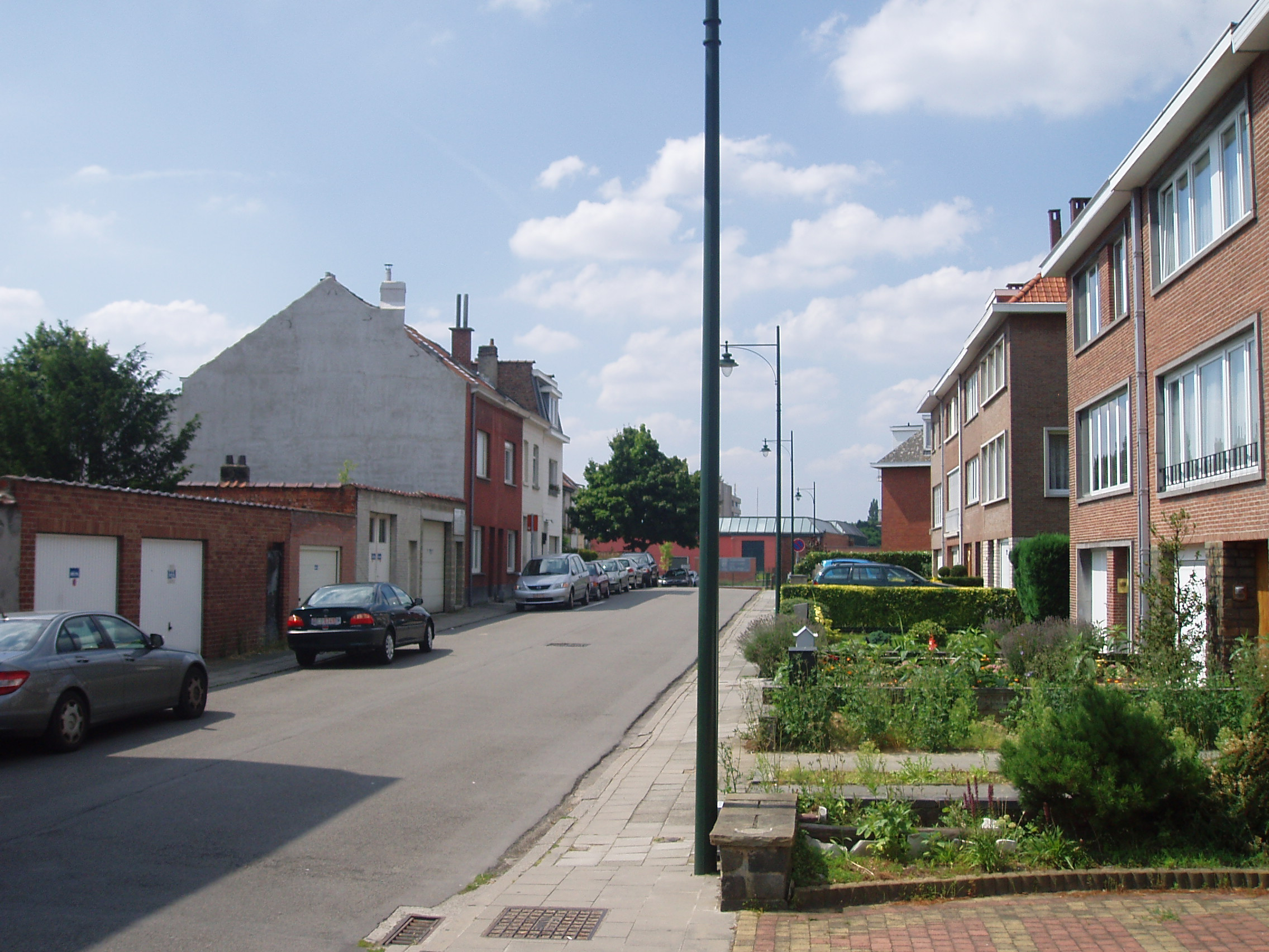 rue du Villageois Auderghem Belgium